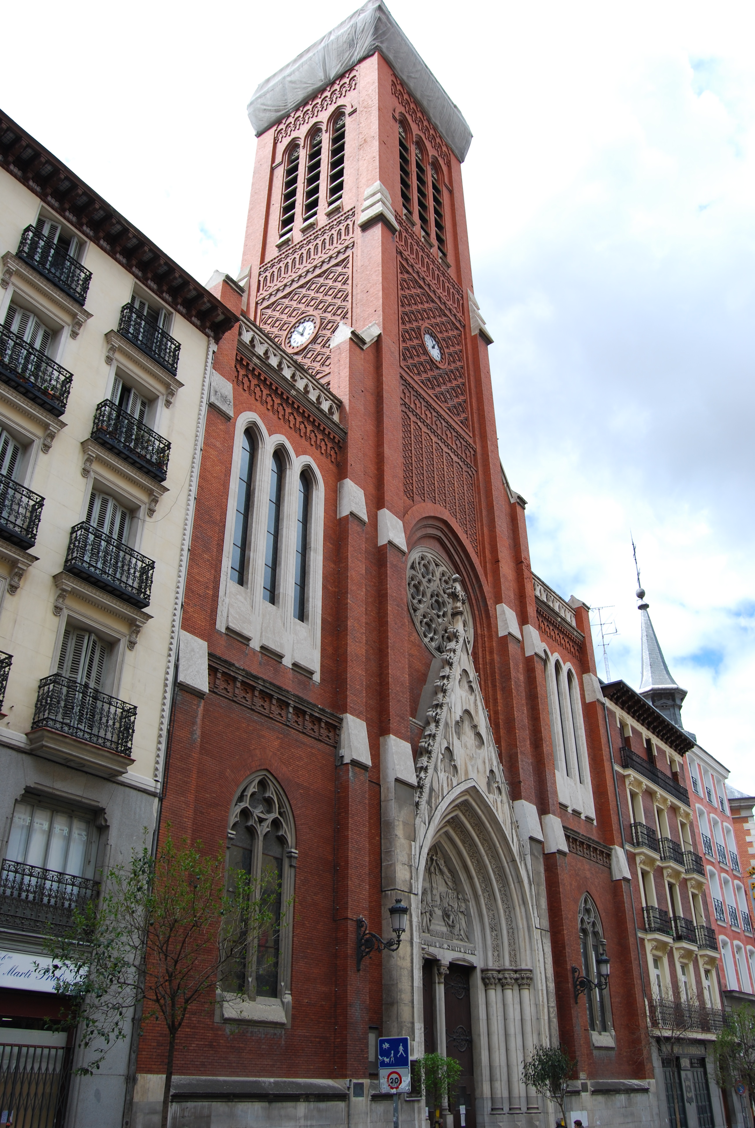 Imagen de la fachada de la Parroquia de Santa Cruz de Madrid, edificio terminado en 1902, en la calle Atocha.